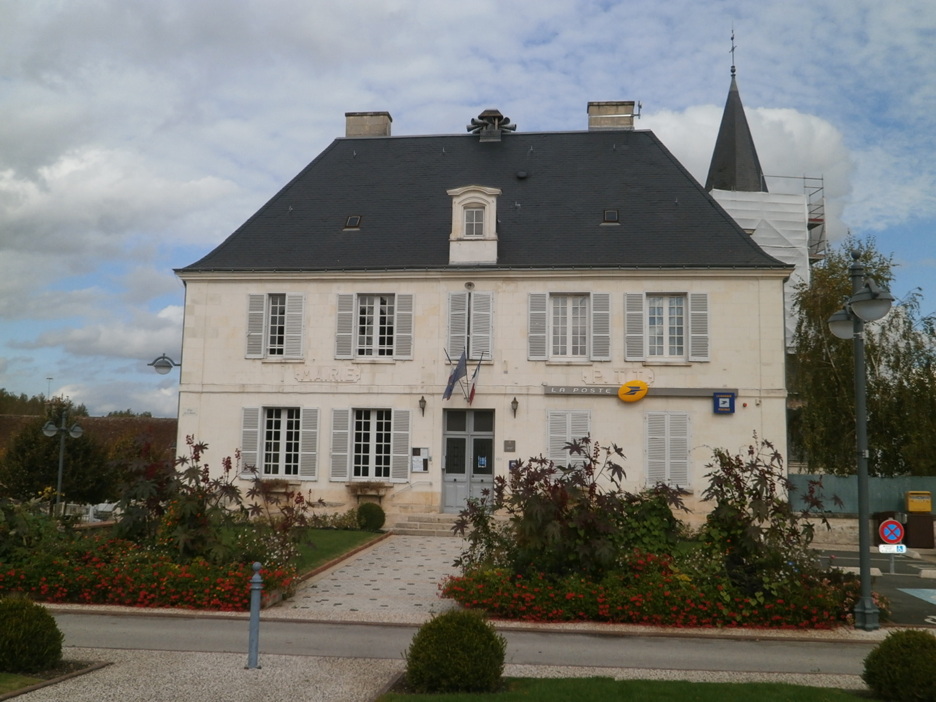 Mairie de Perrusson